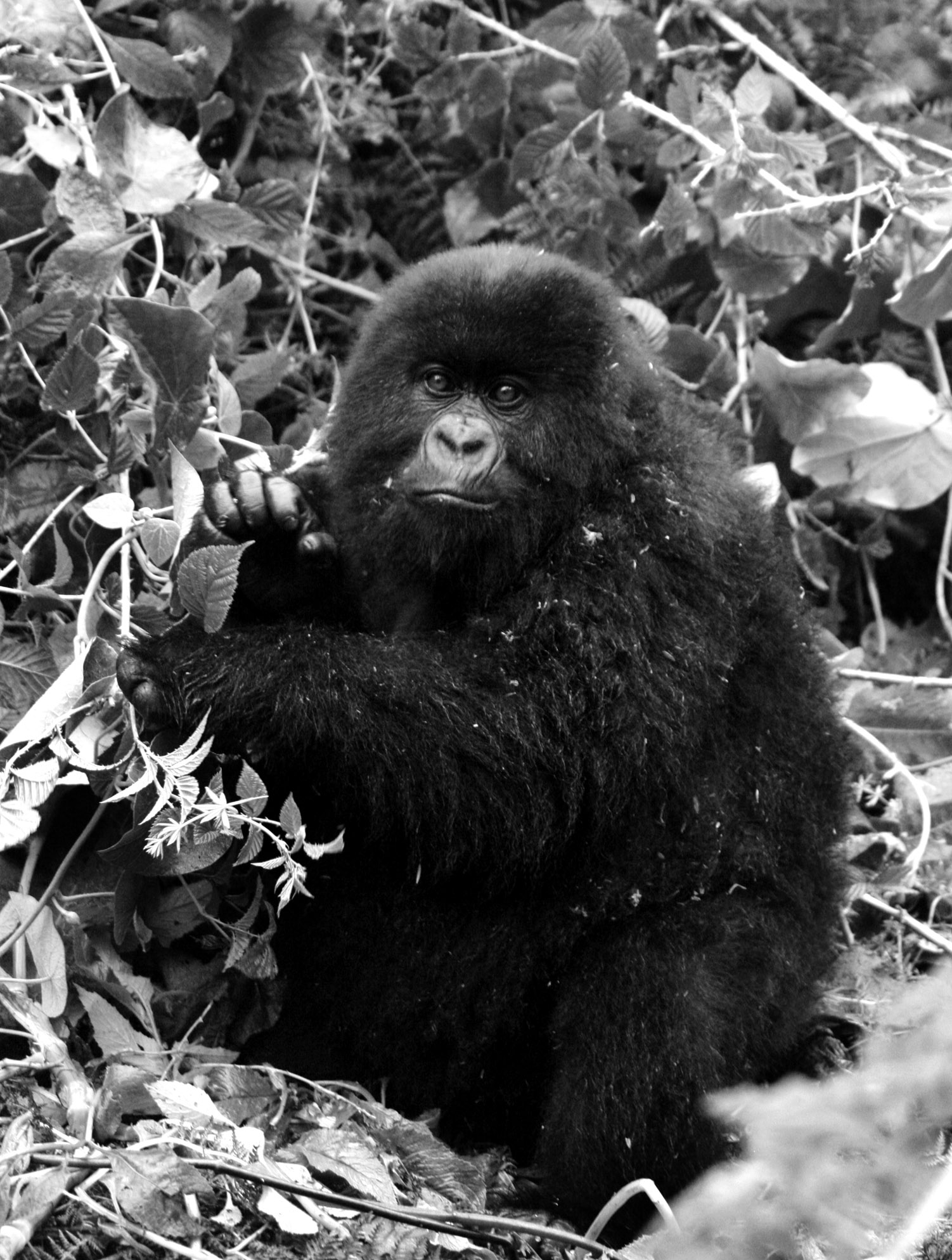 Mountain goilla, Rwanda